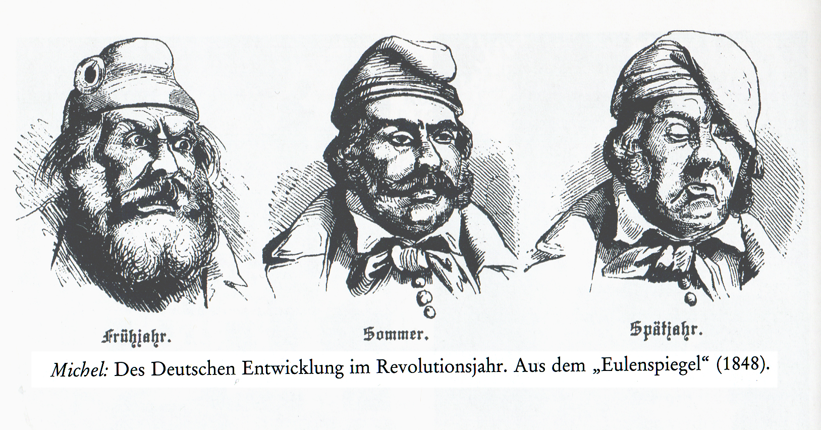 Карикатура, изображающая пыл немцев (Михель - так было принято называть рядовых немцев) на разных этапах революции 1848г.: сначала разъяренные, затем успокоившиеся, а в конце - и вовсе в спальном колпаке